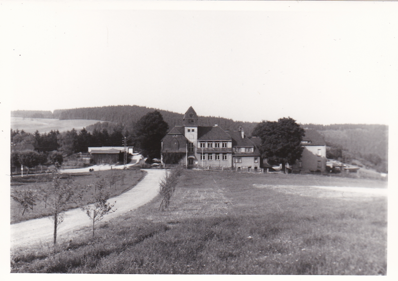 Schönheide im Erzgebirge, Ortsteil Schädlichsberg: Die ehemalige Hammerschule vor ihrem Umbau, bei dem auch der Turm bis auf die Höhe des Daches abgebaut wurde. Zu sehen sind die Flächen des früheren Uttmannschen Vorwerks, die von den 1970er Jahren an für Ein- und Mehrfamilienhäuser bebaut wurden. Links im Hintergrund: Wiesen des Ortsteils Webersberg.Das Foto wurde in der 2. Hälfte der 1960iger Jahre mit einer Exakta Varex IIb von Ihagee Dresden gemacht.